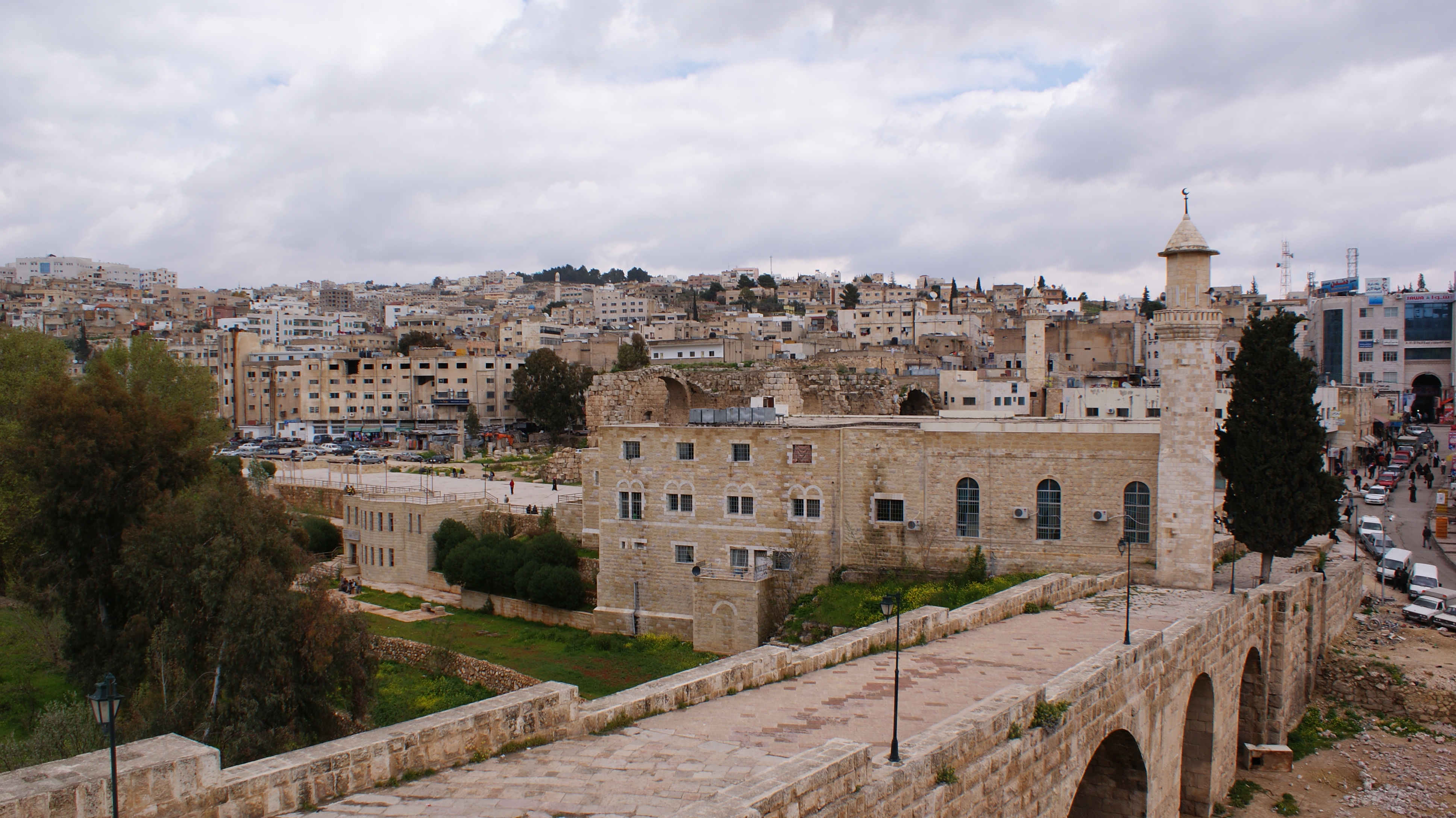 منظر لوسط مدينة جرش بالأردن - وتظهر القناطر التي تربط الآثار بالجزء الحديث بالمدينة، والتي تمر من فوق سيل جرش.